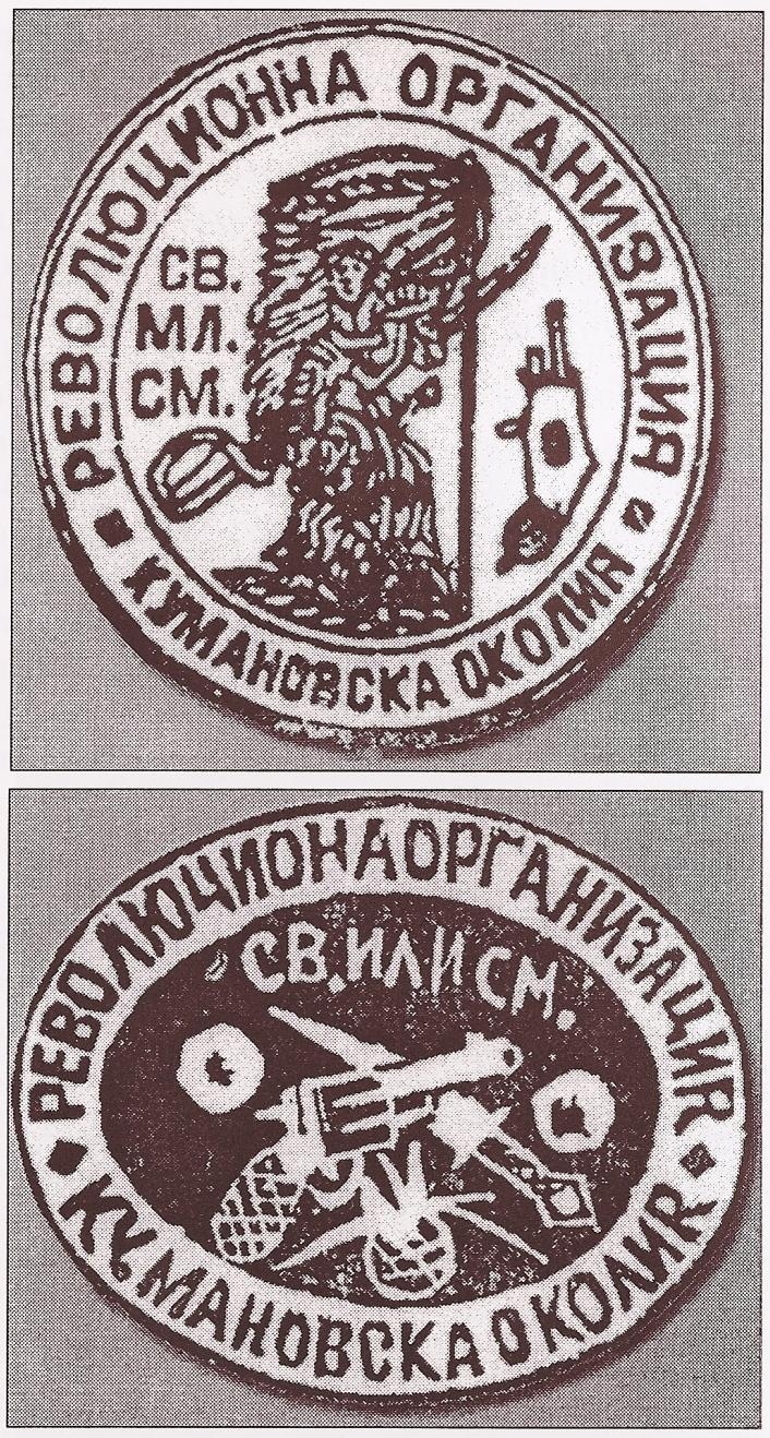 Печати на Кумановския революционен район на ВМОРО.